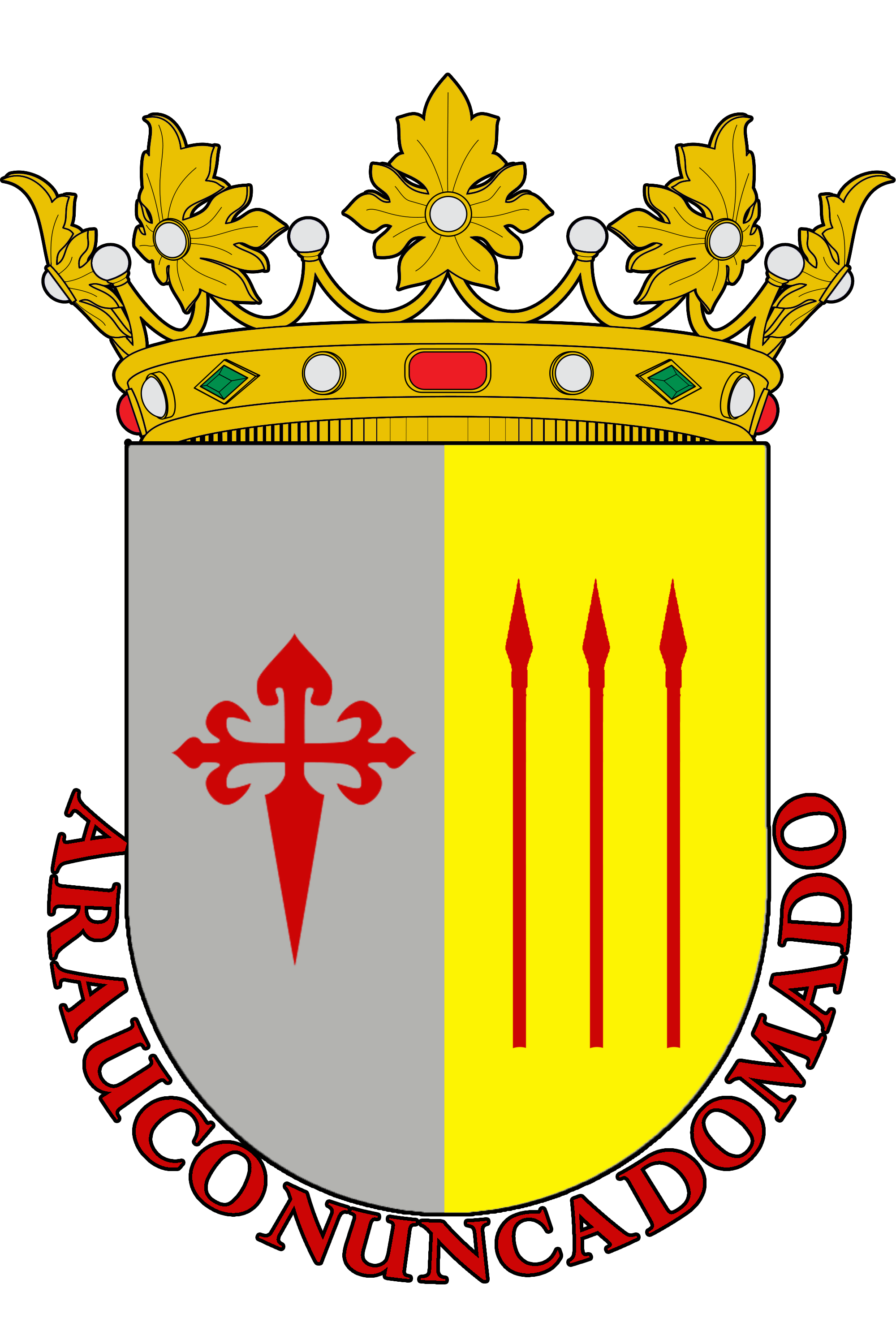 Escudo de armas de la Provincia de Arauco